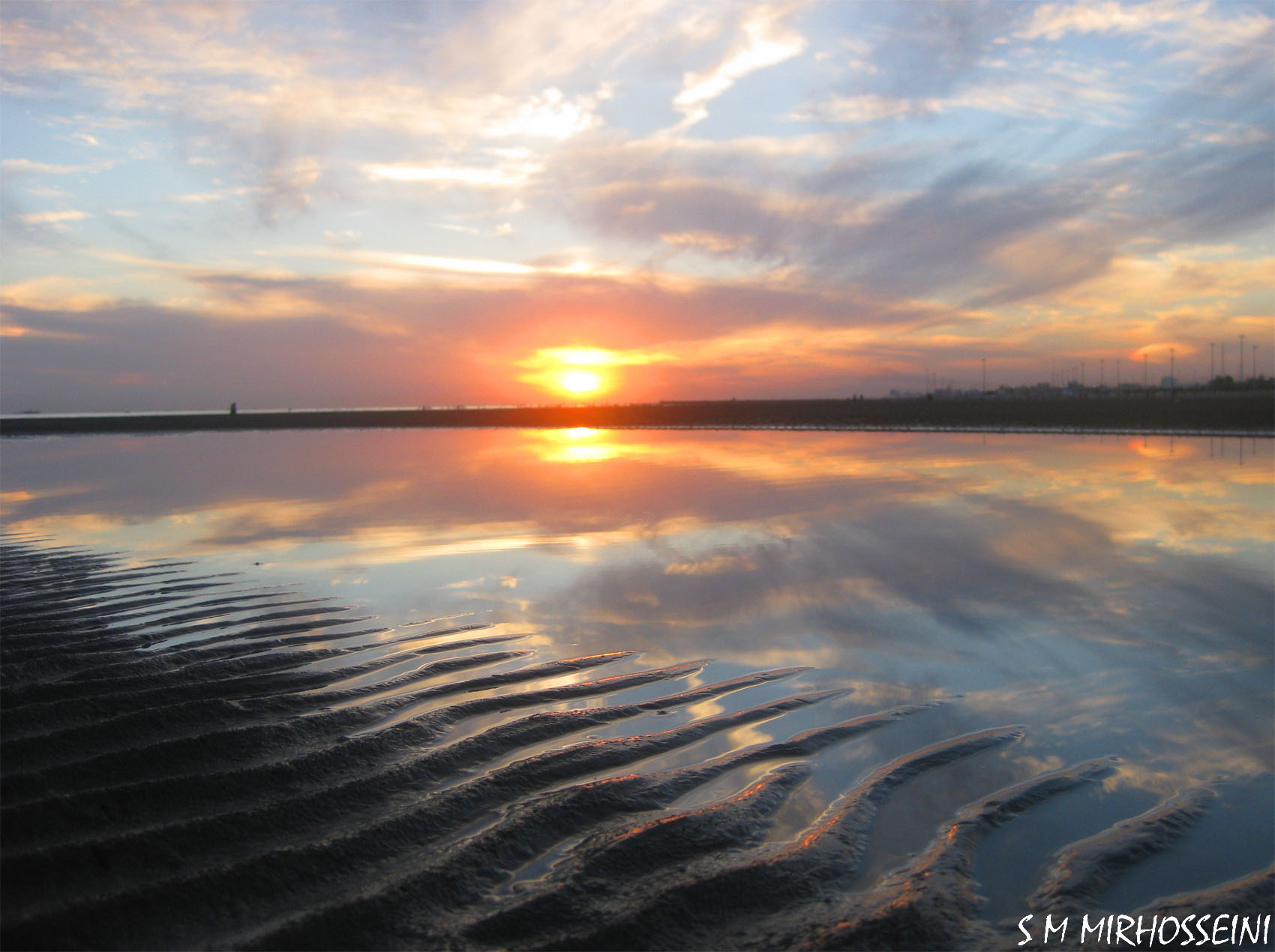 +Sunset, Persian Gulf+